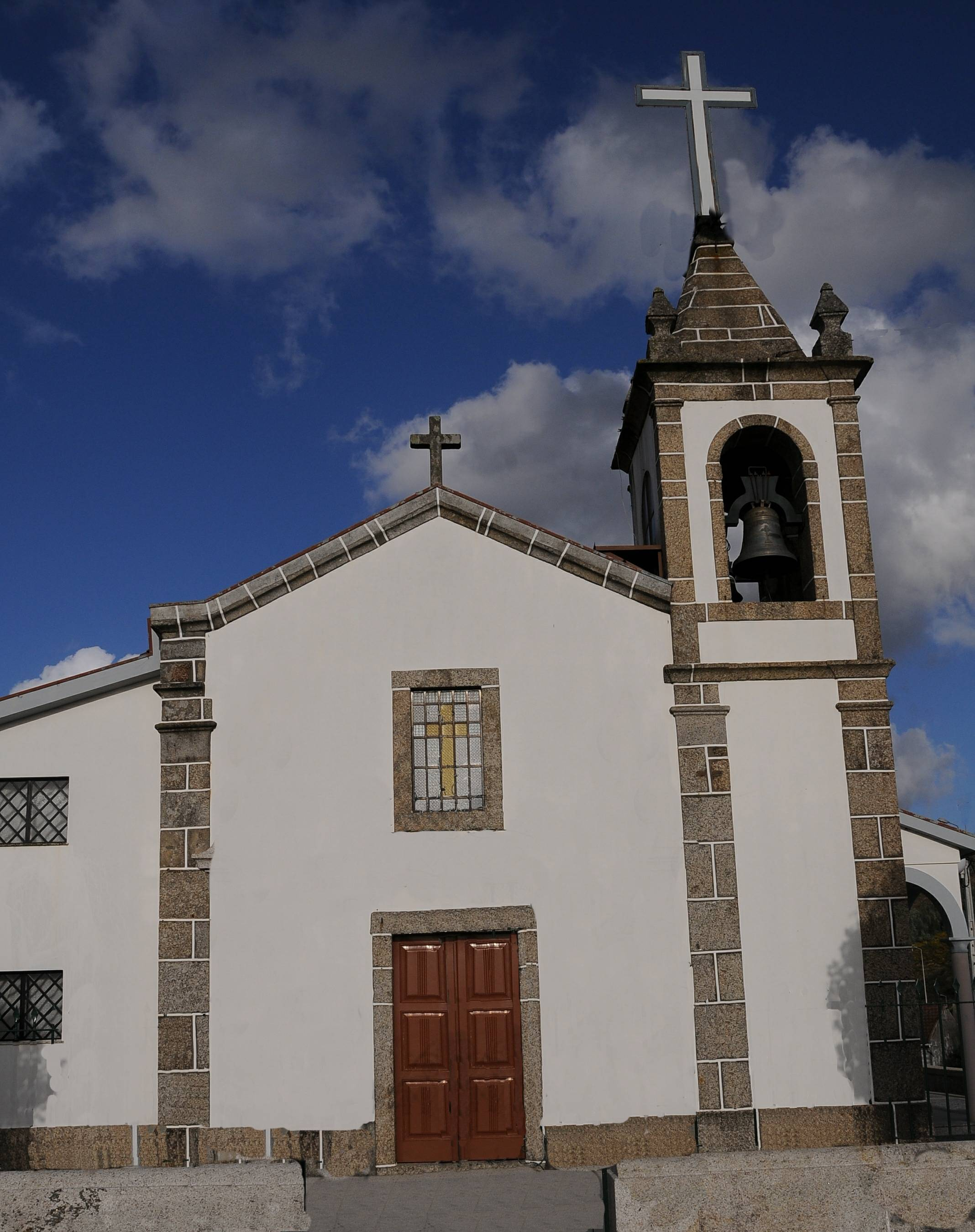 Sao Paio de Arcos Church, in Braga, Portugal